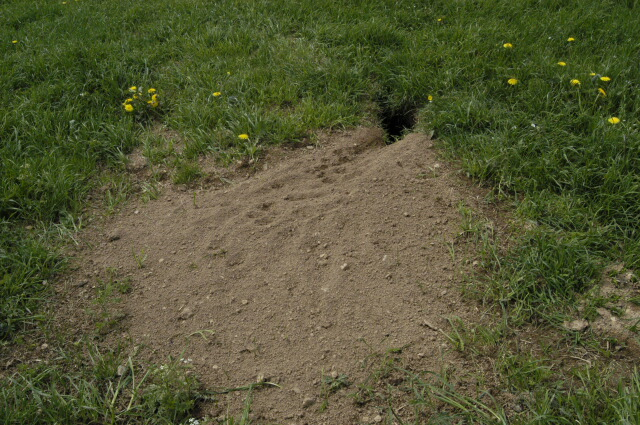 Vulpes vulpes den from Commanster, Belgian High Ardennes (50°15'20``N,5°59'58``E)